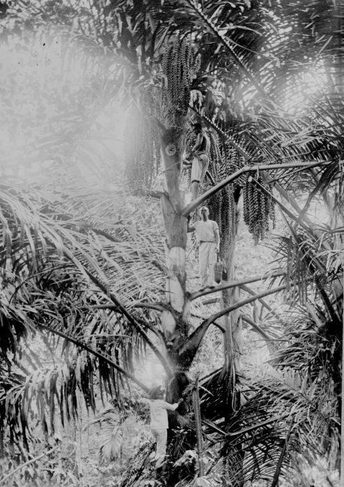 Foto. De arengpalm (Arenga pinnata) kwam net als de sagopalm op ruime schaal in het wild voor. De boom leverde allerlei producten op variërend van vezels voor het dekken van daken tot suiker. In de Molukken werd de boom vooral gewaardeerd vanwege de palmwijn die gemaakt kan worden van het sap van de onrijpe bloemkolven. Dit heette toewak (tuak) of sagoweer (saguer). Het verse sap, oftewel het 'suikerwater', werd ook wel zo gedronken. Wilde men er 'wijn' van maken dan moest men het laten gisten. Laat men het echter te lang gisten dan gaat de alcohol in azijn over. Dit alles gold trouwens ook voor een aantal andere palmen, zoals de kokos-, de lontar- en de gebangpalm. (P. Boomgaard, 2001). Het tappen van een arengpalm op Ambon, Molukken. Het tappen van de arènpalm op Ambon, Midden-Molukken, 1919